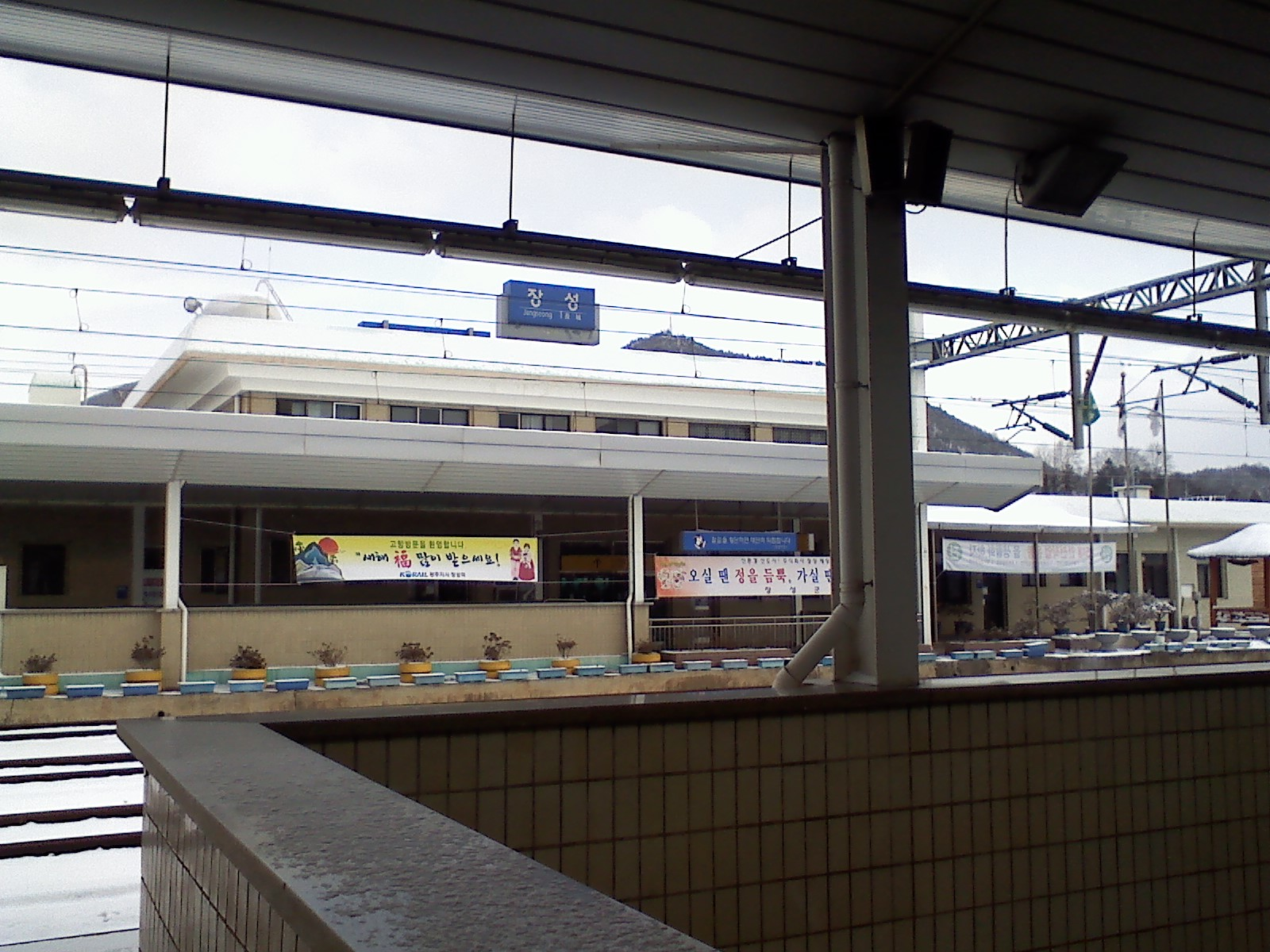 제가 직접 촬영한 사진입니다.